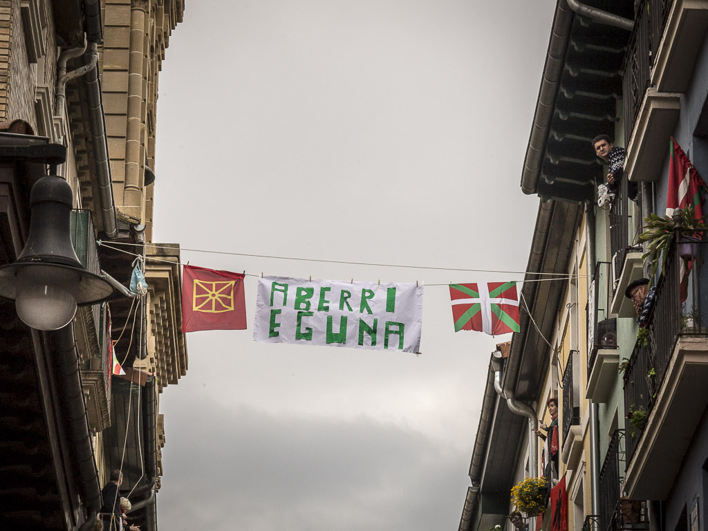 Aberri Eguna COVID-19aren konfinamenduan. Jendeak balkoietan ikurrak jartzeko deialdia egin zen. Irudi guztiak ikusteko